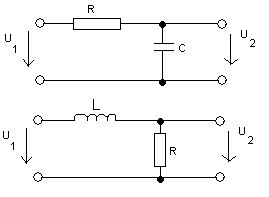 integrační článek